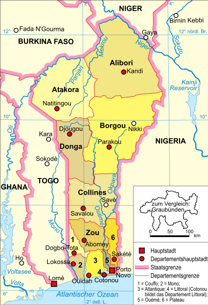 politische Karte Benins